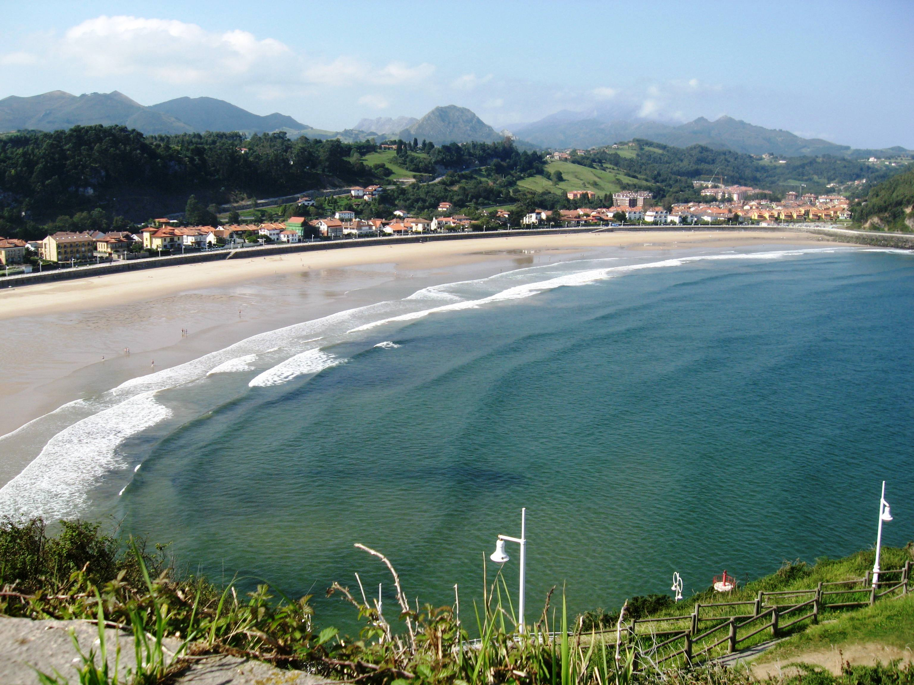 Ribadesella